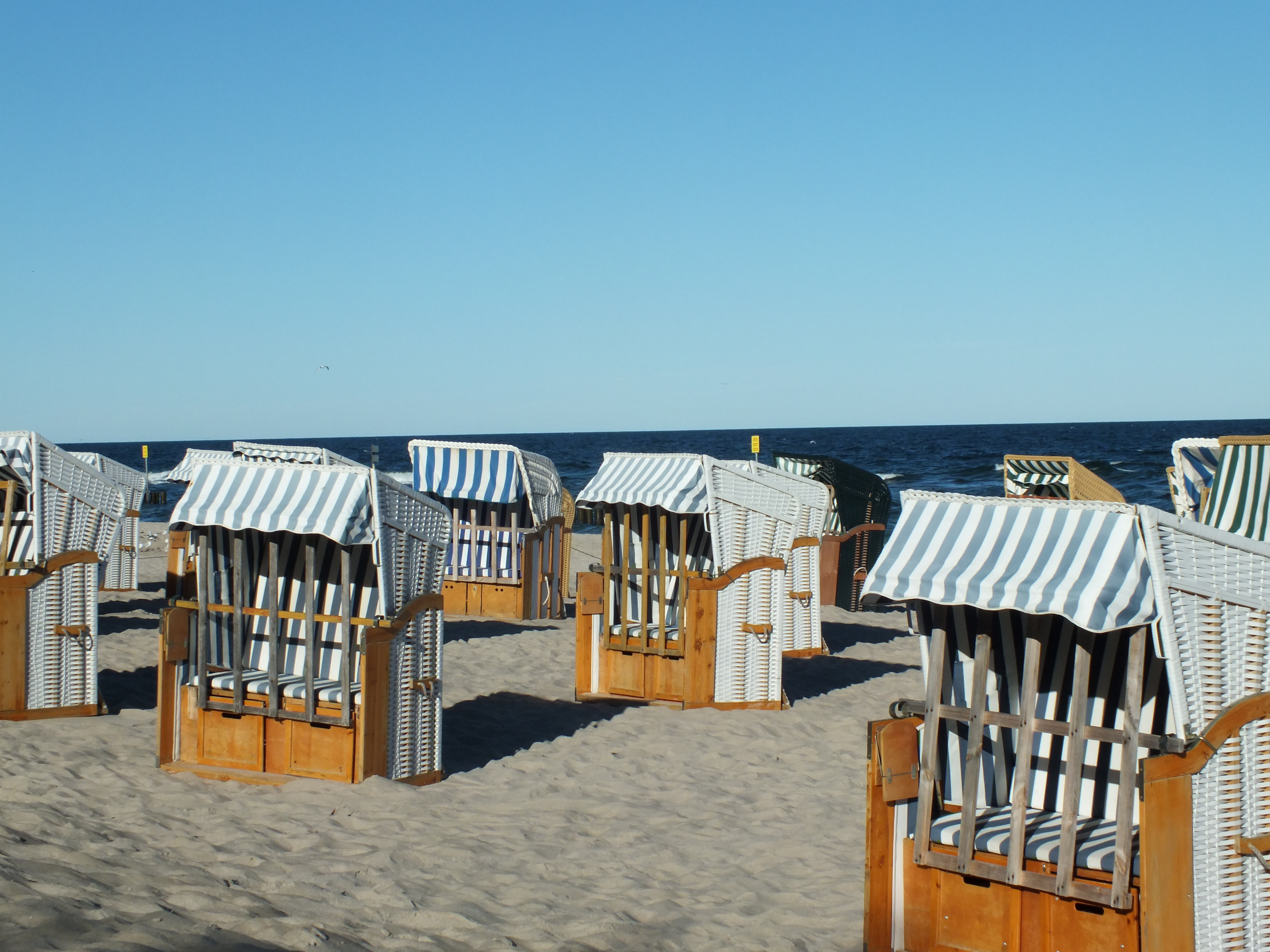 Kołobrzeg, kosze plażowe